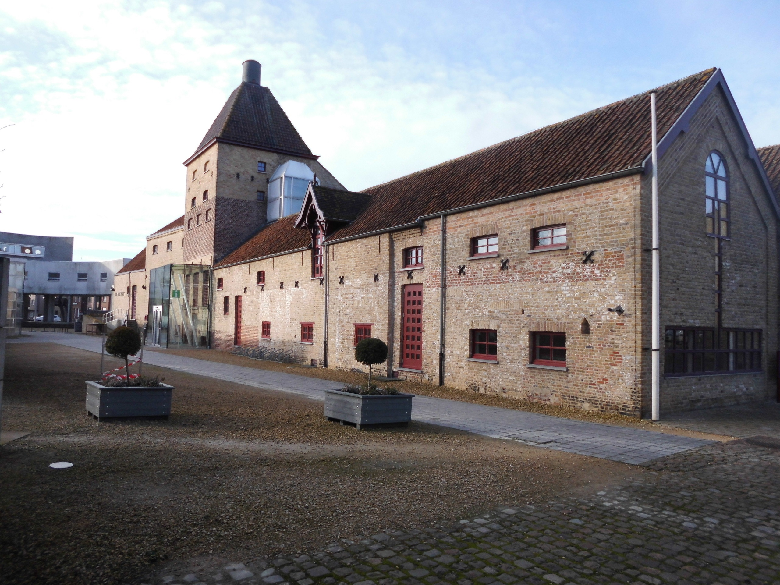 Brouwerij Christiaen - Sint-Maartensplein - Koekelare - West-Vlaanderen - België